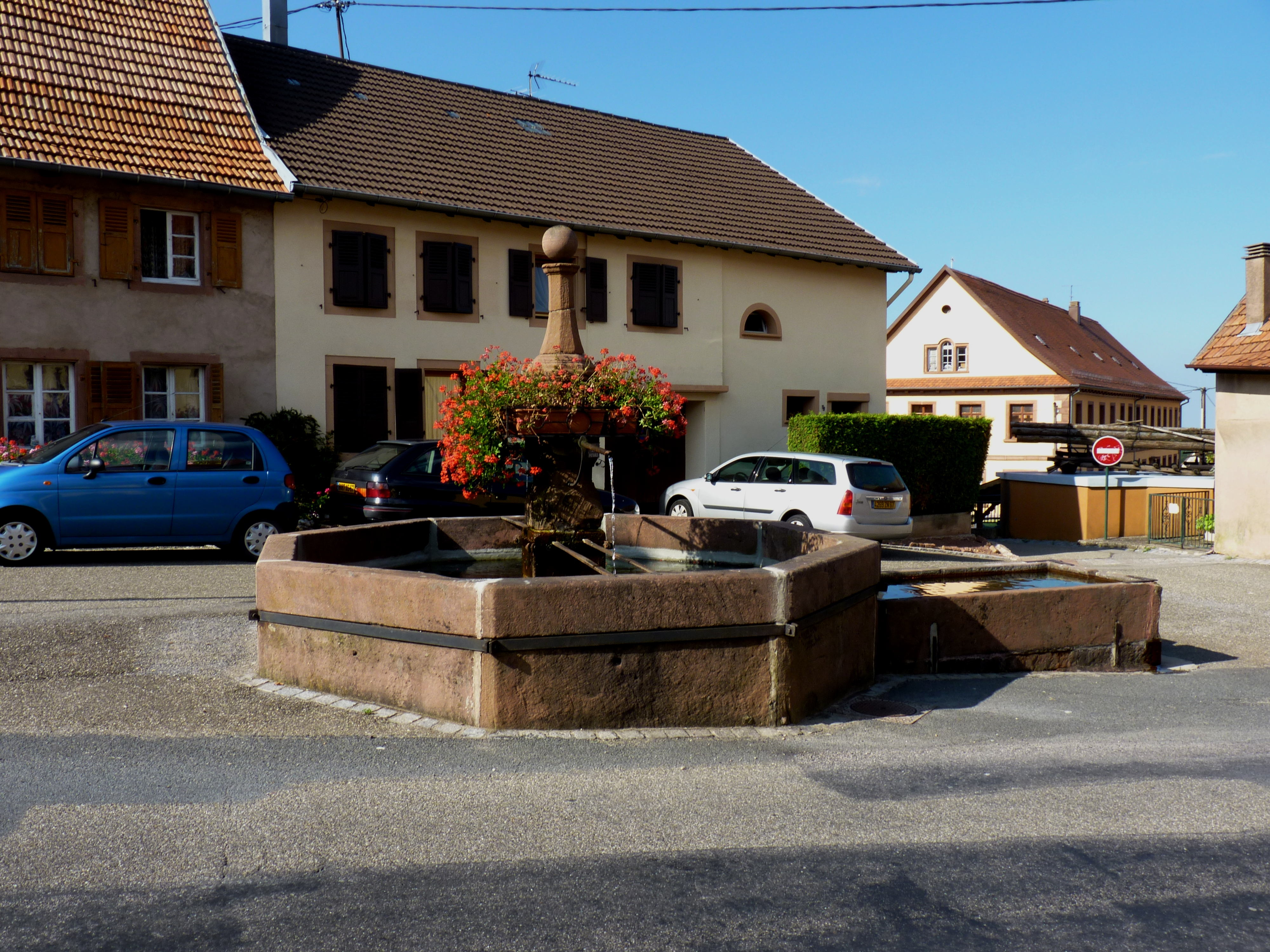 Grendelbruch, Fontaine rue du Champ du Feu